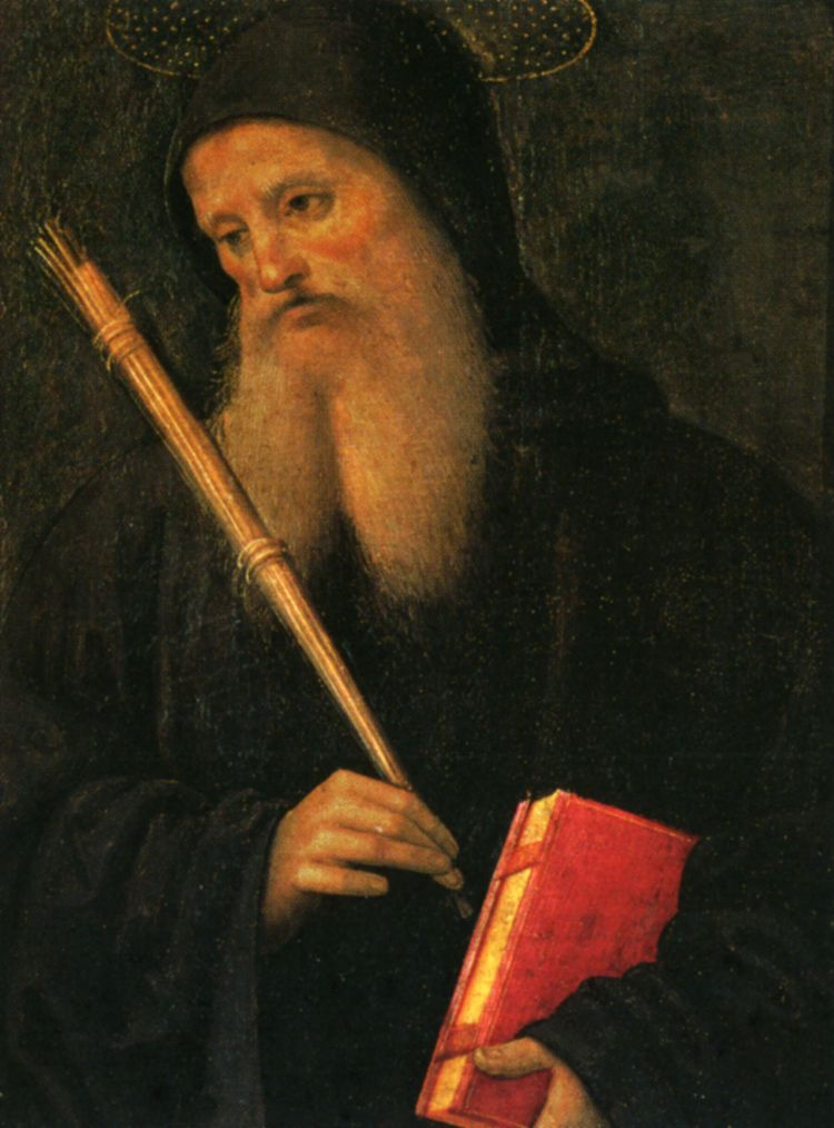 Pietro Perugino: Polittico di San Pietro (San Benedetto). Cat. no. 48 in Vittoria Garibaldi: Perugino. Catalogo completo. Octavo, Firenze 2000, ISBN 88-8030-091-1